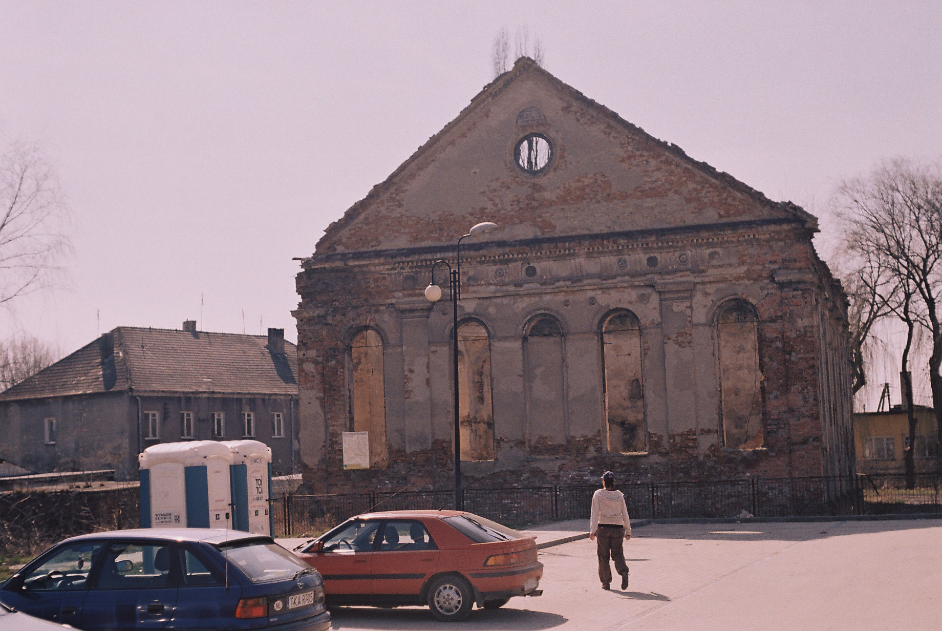 Działoszyce - Synagoga (zabytek nr A/630 z 4.01.1988)